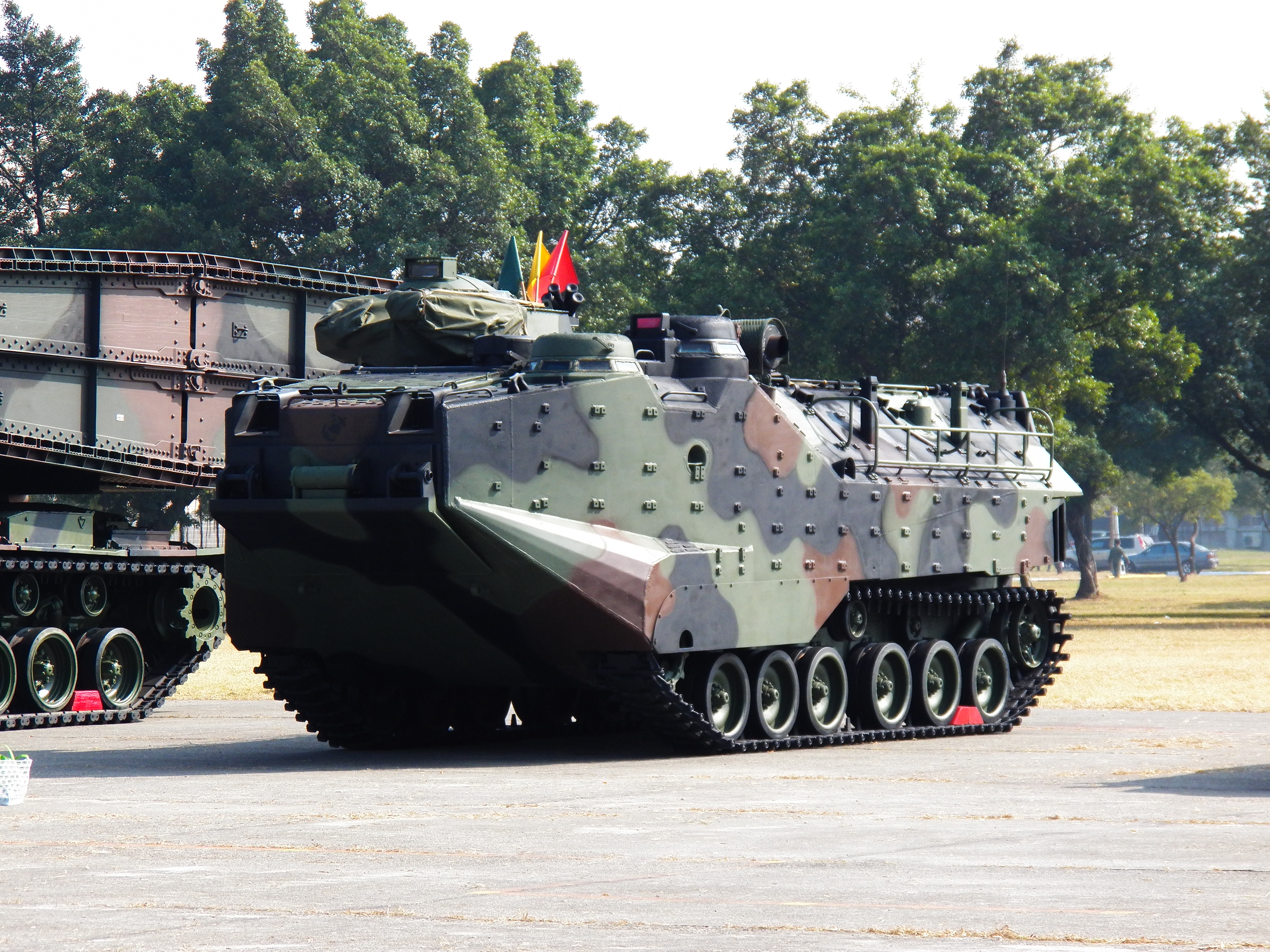 2012年陸軍步兵學校營區開放活動，操場展示之海軍陸戰隊AAV-7A1。